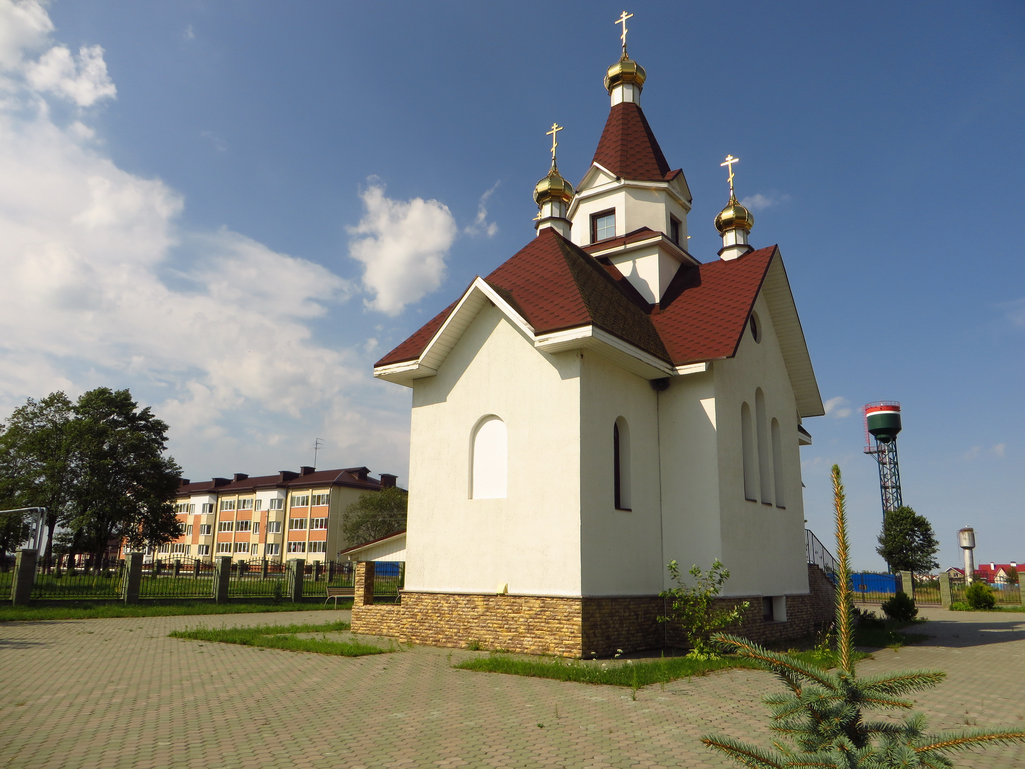 Храм Святой праведной Анны, Теплень